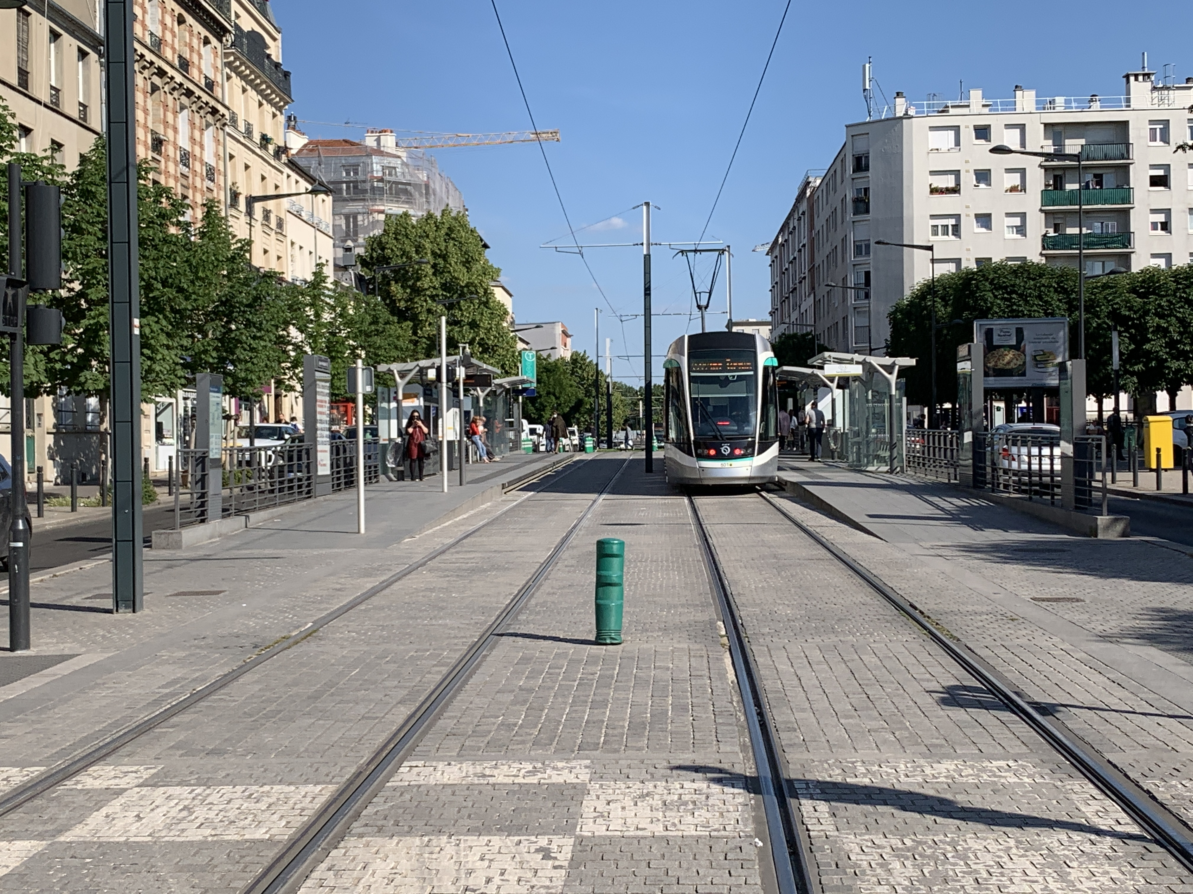 Station de tramway Pierre de Geyter, Saint-Denis, Seine-Saint-Denis.